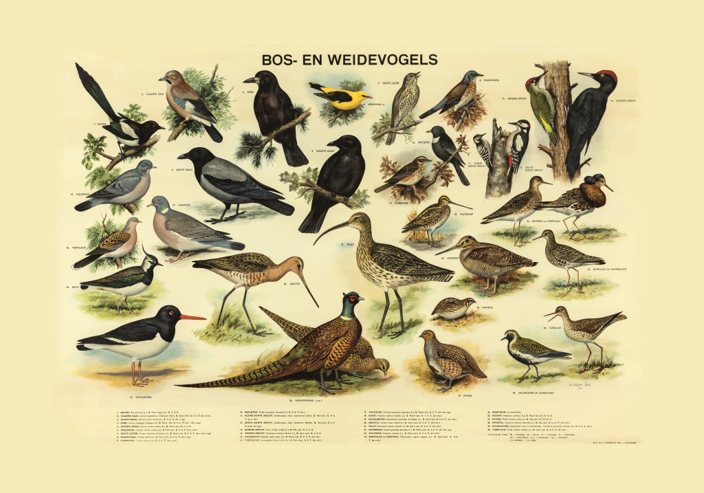 wandplaat Bos- en weidevogels getekend door H.J. Slijper, uitgegeven door W.J. Thieme & Cie in 1953